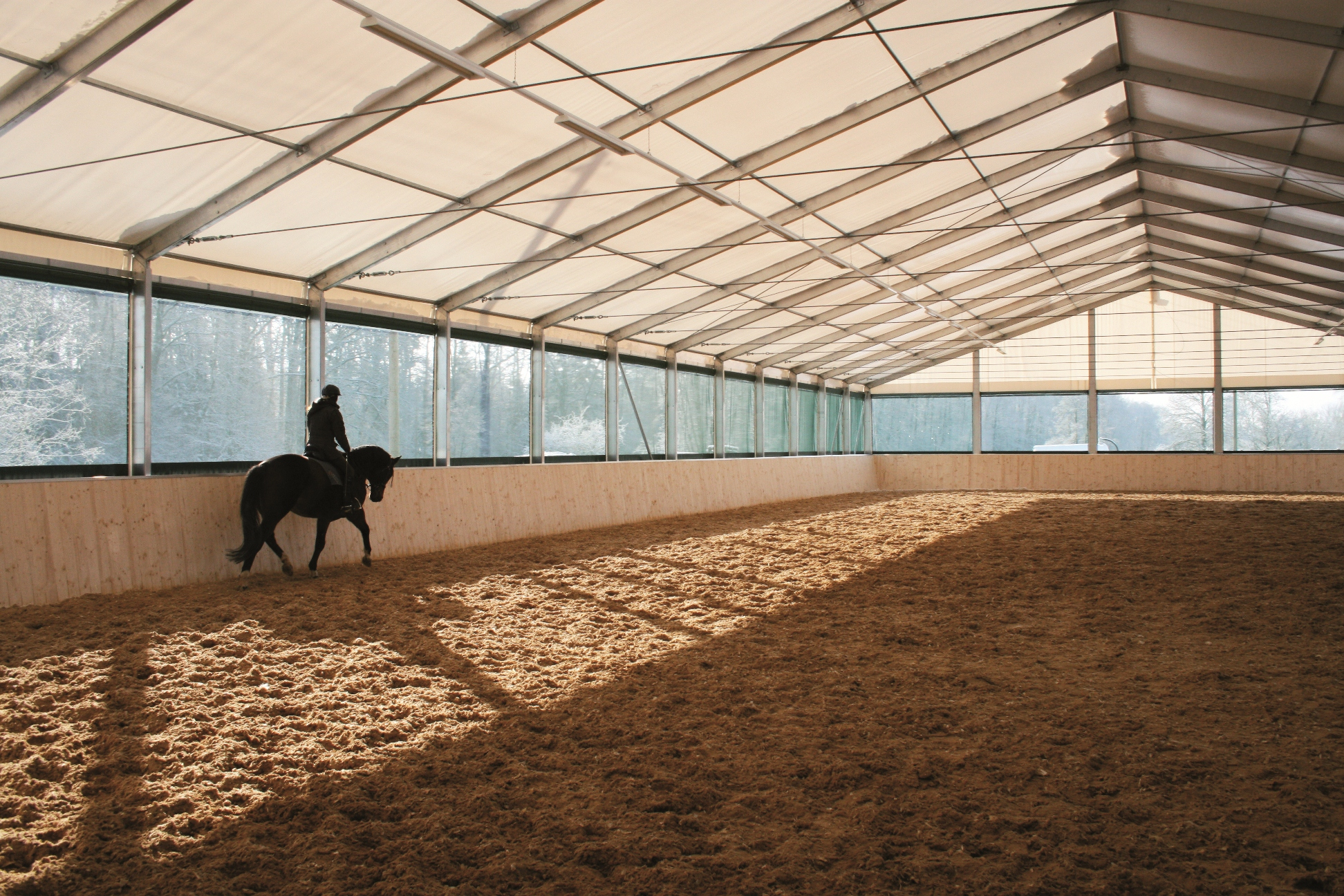 Reithalle, Reitzelt, genehmigungspflichetige Bauwerke, Equitent, indoor riding arena